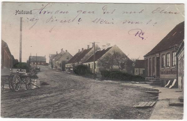 Nørregade i Hadsund ca. 1900